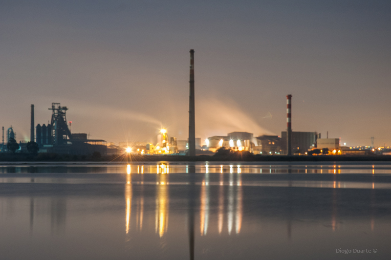 Barreiro_DBD_DSC3522